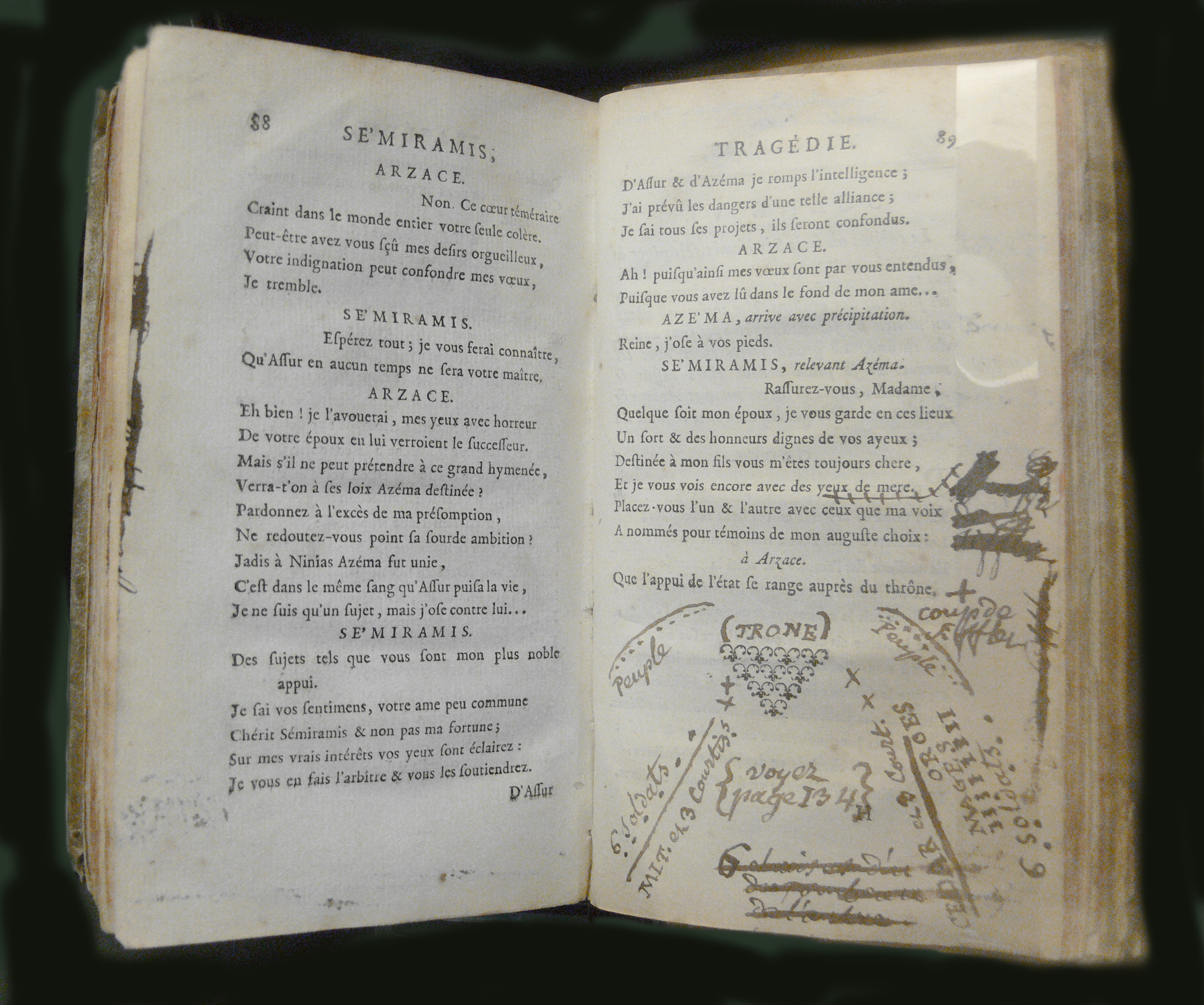 Regiebuch einer französischen Theatertruppe zu Sémiramis (Trauerspiel von Voltaire), Mannheim, um 1749 Collection: Reiss-Engelhorn-Museen, Mannheim